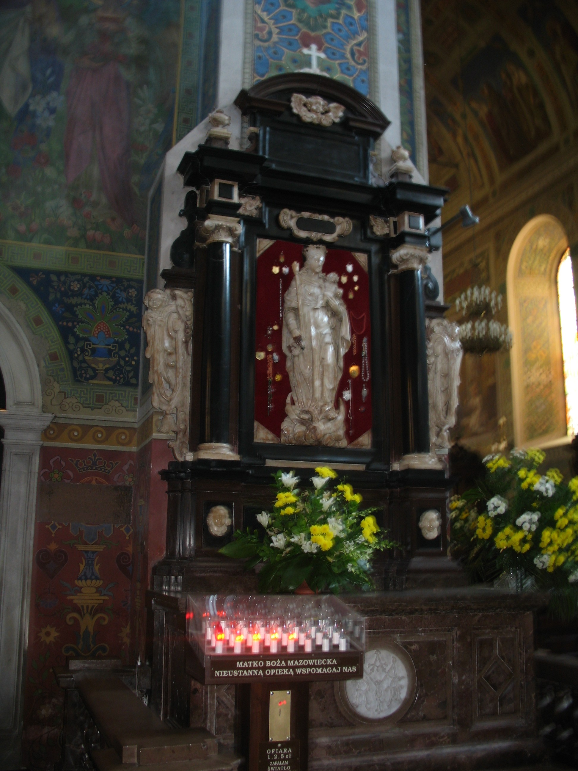 Ołtarz Matki Bożej Mazowieckiej w katedrze płockiej.